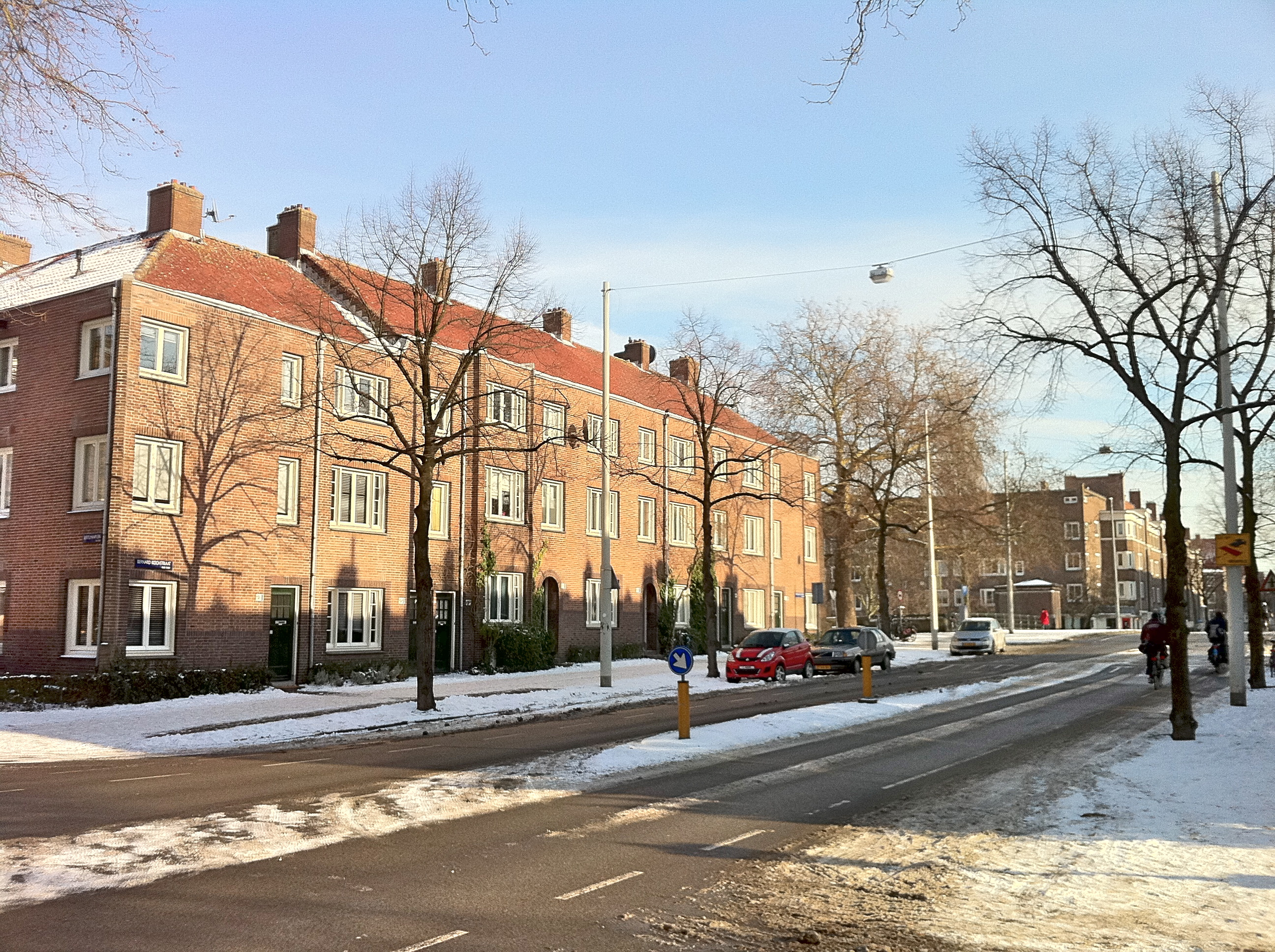 Amsterdam-Zuid. Bouwblok van 80 etagewoningen, gebouwd door Bouwvereeniging Rochdale, blok E fase 2. Amsterdam - Bertelmanstraat 1.